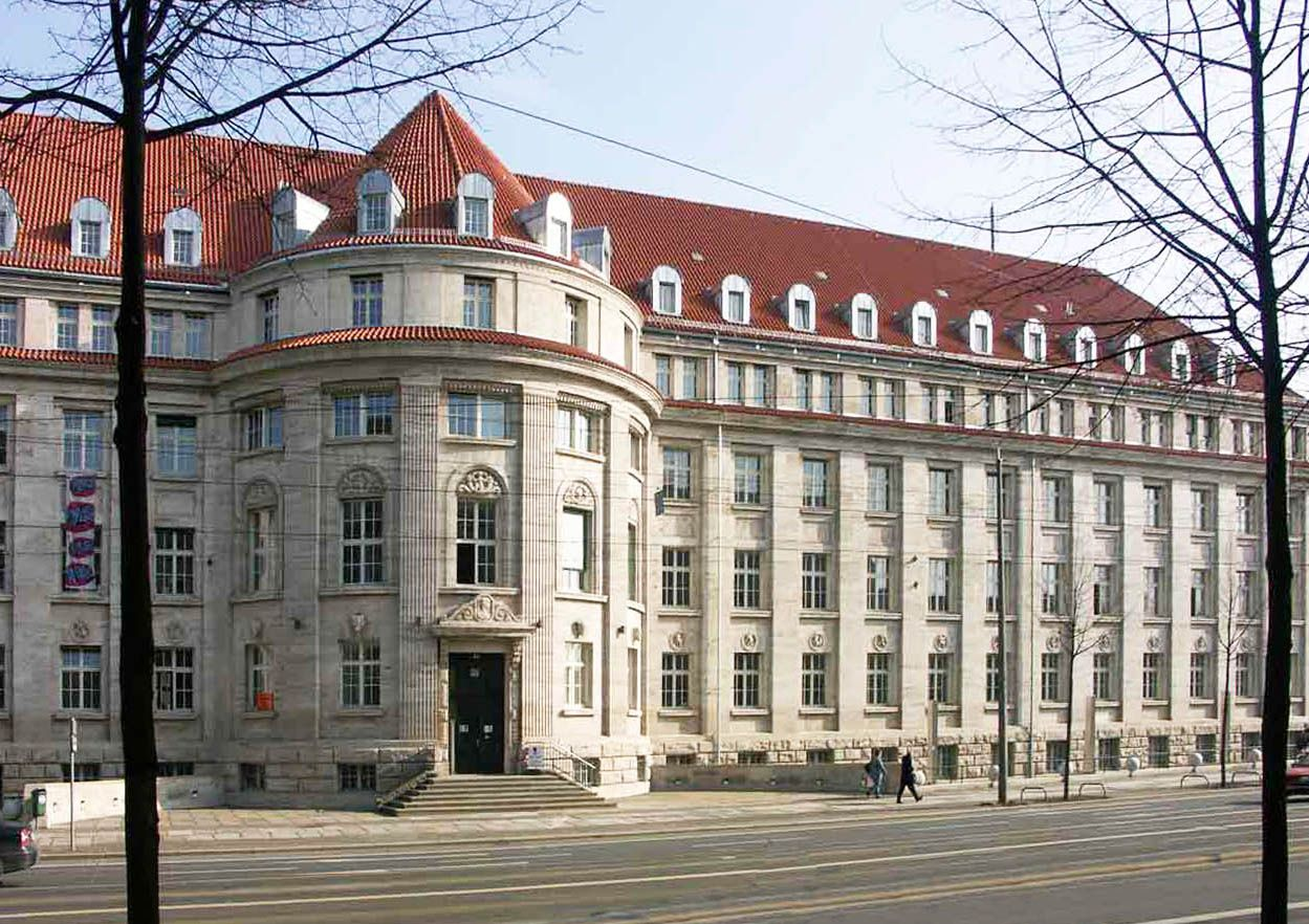 ehemaliges Verwaltungsgebäude der Teutonia Versicherungs-AG, erbaut 1913-1915; zwischen 1923 und 1945 Sitz des Landesfinanzamts Leipzig, zwischen 1949 und 1990 Sitz der SED-Bezirksleitung Leipzig; Karl-Liebknecht-Straße 143 / Richard-Lehmann-Straße, Leipzig-Connewitz; unter Denkmalschutz